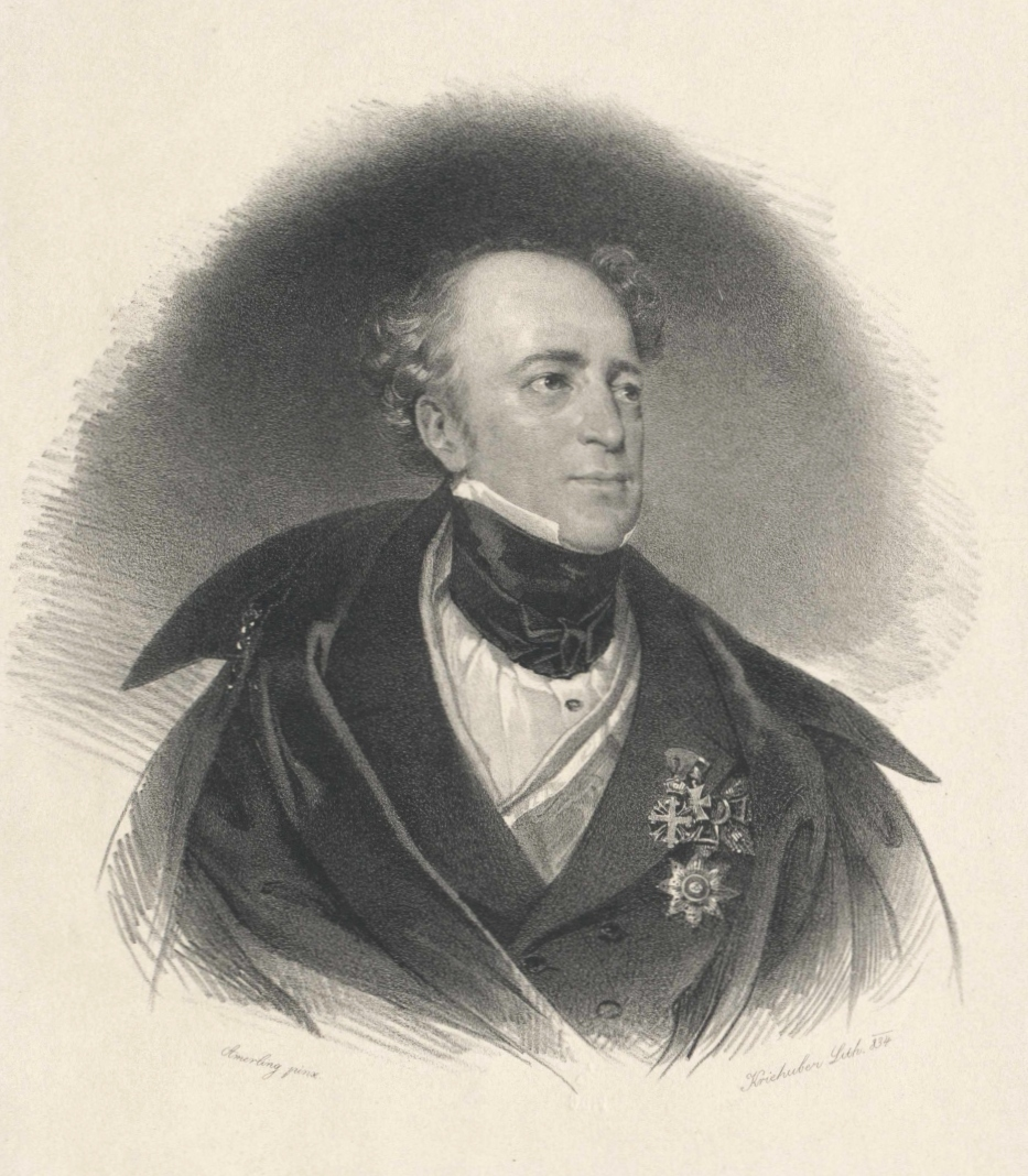 Karl Chotek (1783–1868)